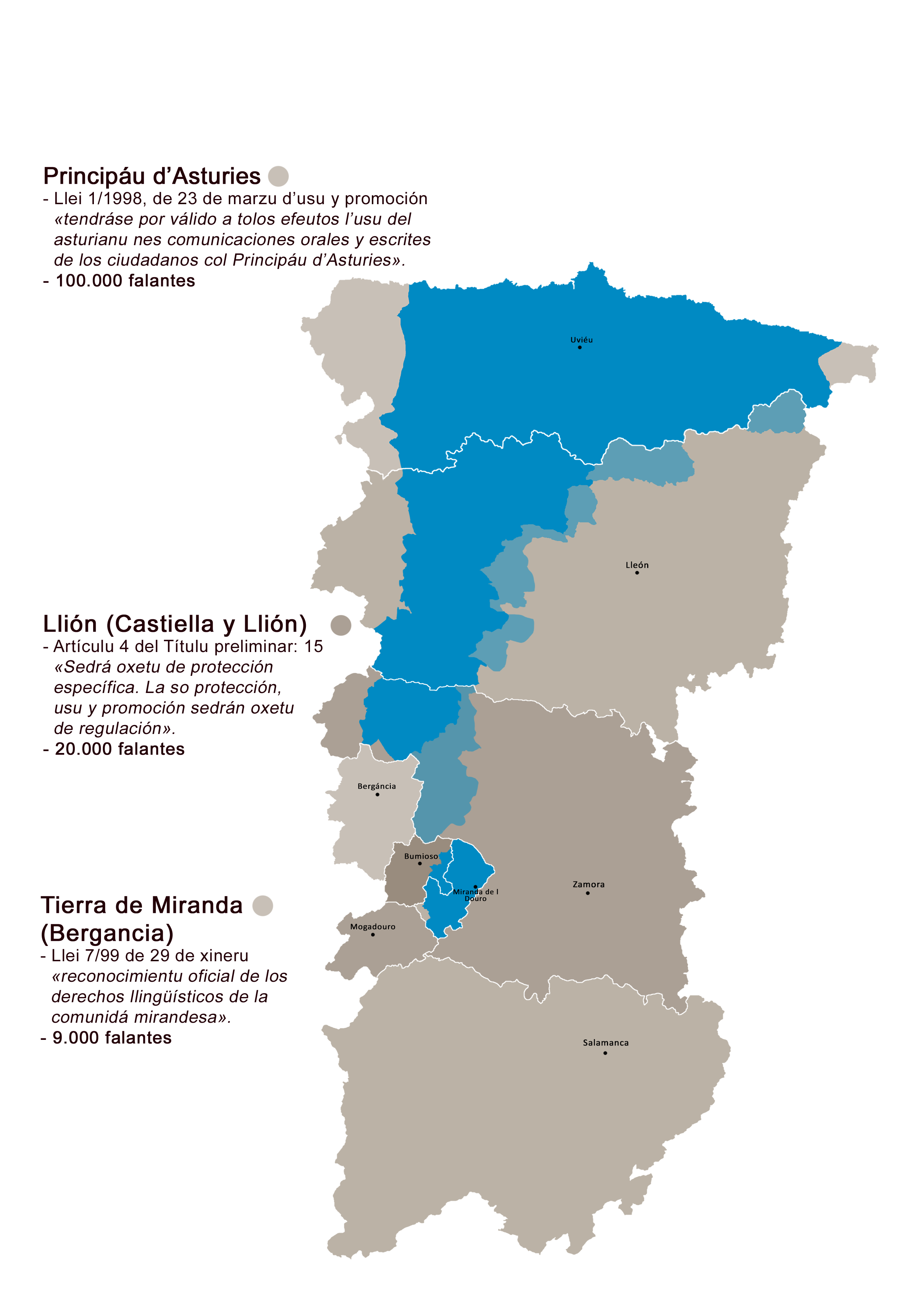 Regulación llegal de la llingua asturiana según territorios.